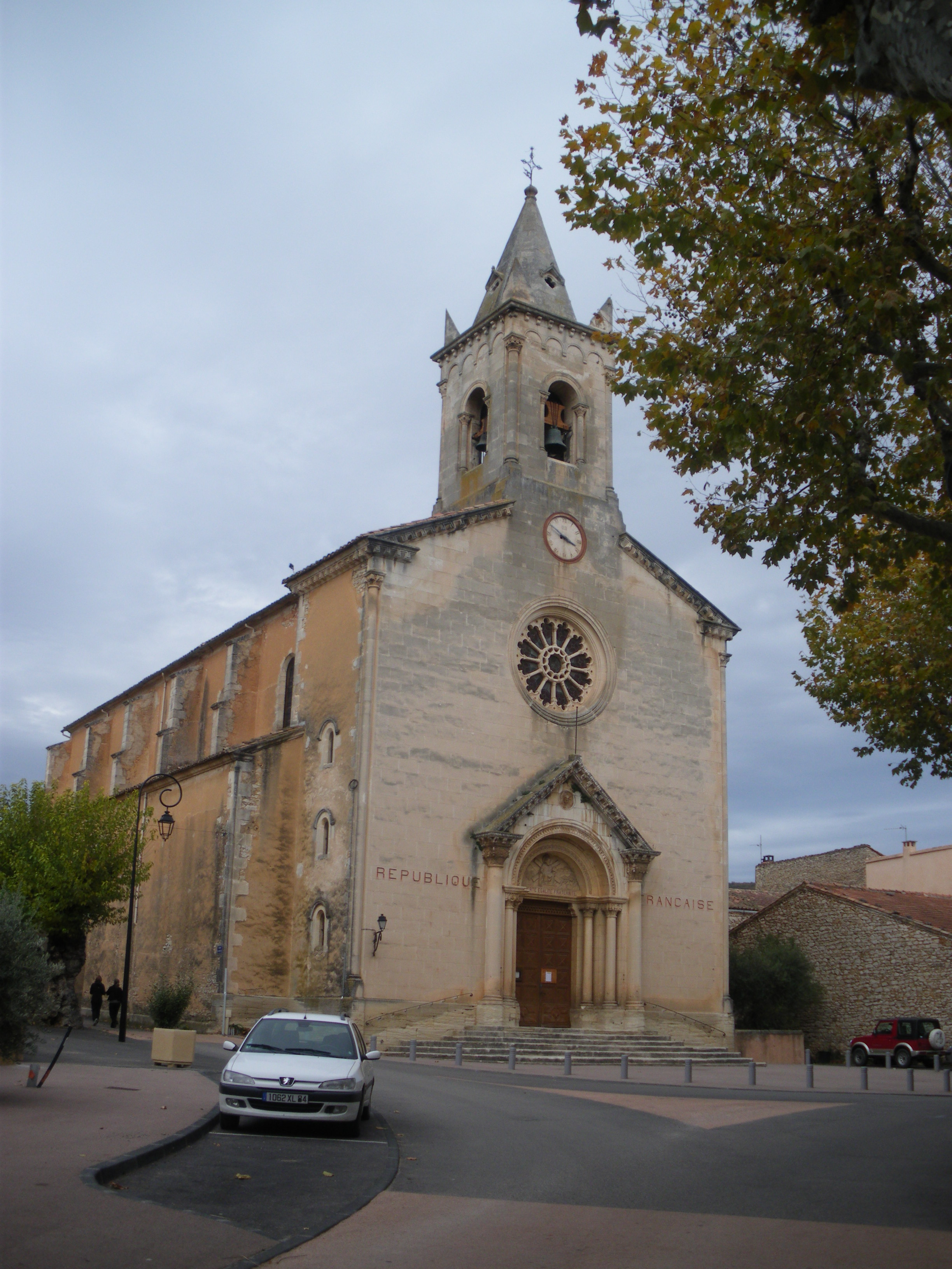 église de Ville sur Auzon, Vaucluse, France